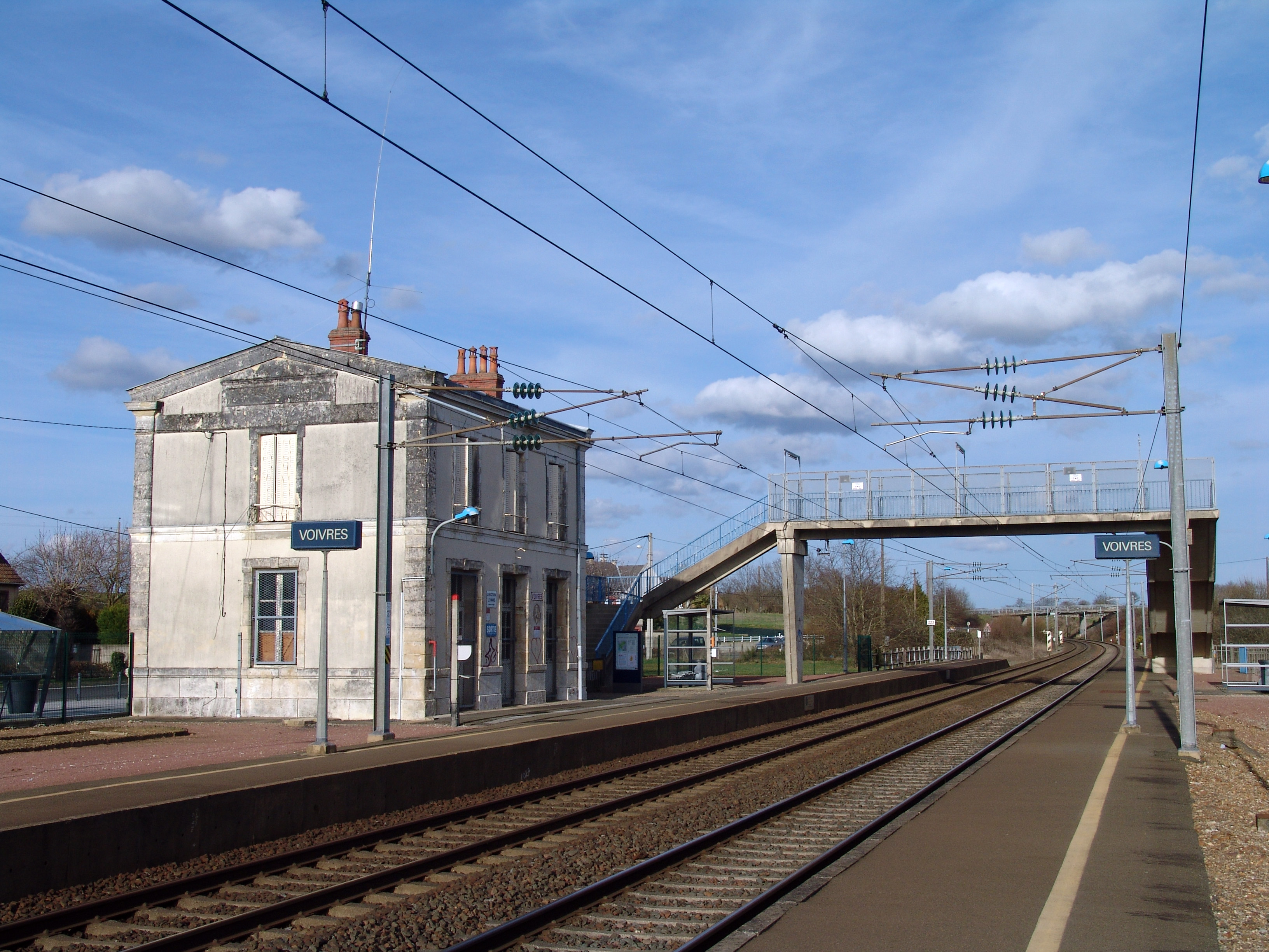 Le bâtiment voyageurs de la gare de Voivres-lès-le-Mans coté voies, la passerelle et les quais.